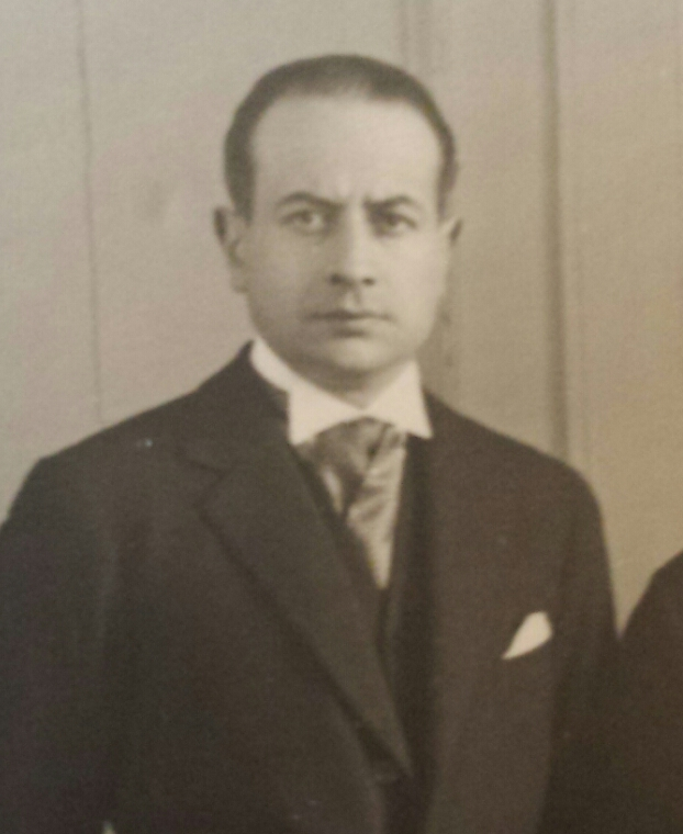 Bernard S.de Breuvery